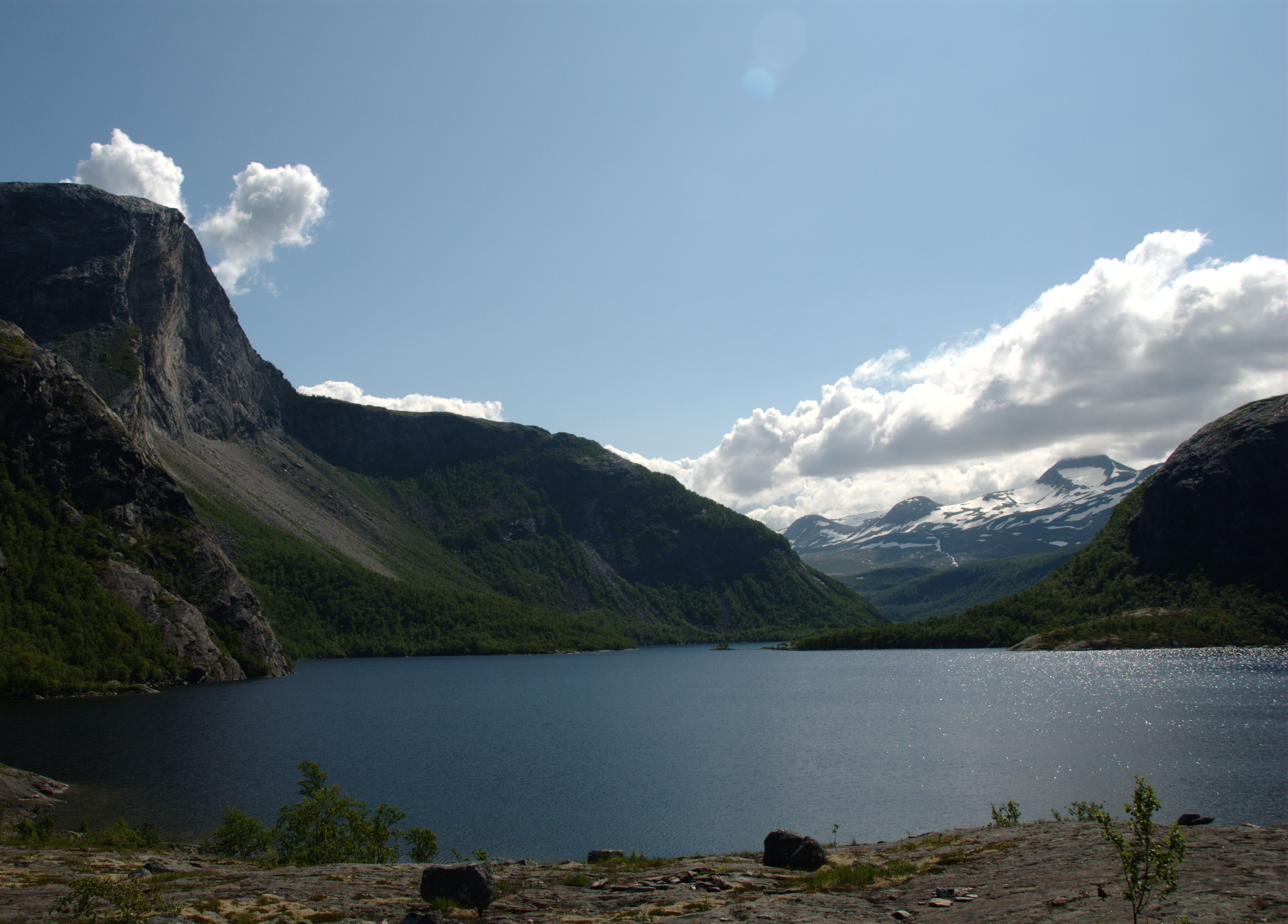 Børvatnet